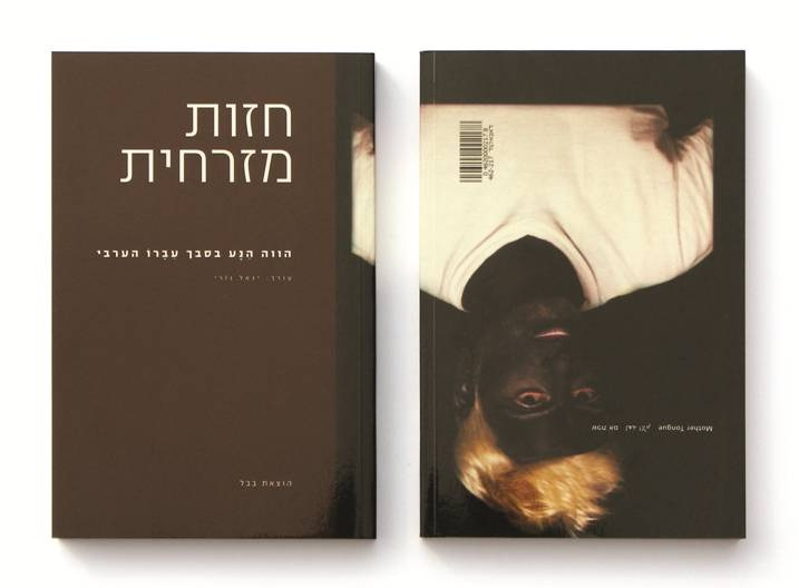 קטלוג התערוכה "שפת אם" בתוך: חזות מזרחית/שפת אם, הווה הנע בסבך עברו הערבי, יגאל נזרי (עורך), הוצאת בבל. 2004